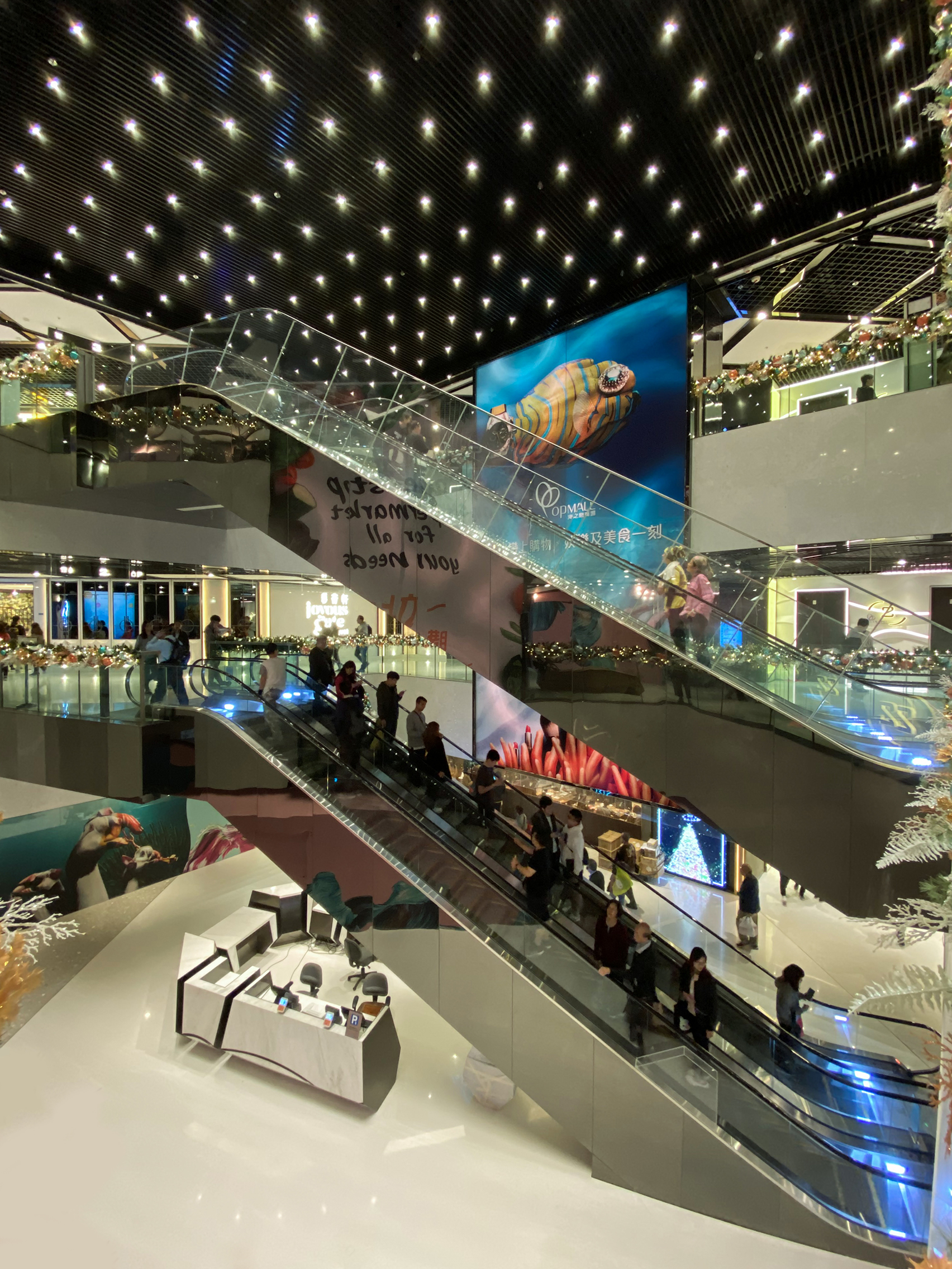 OP Mall Atrium